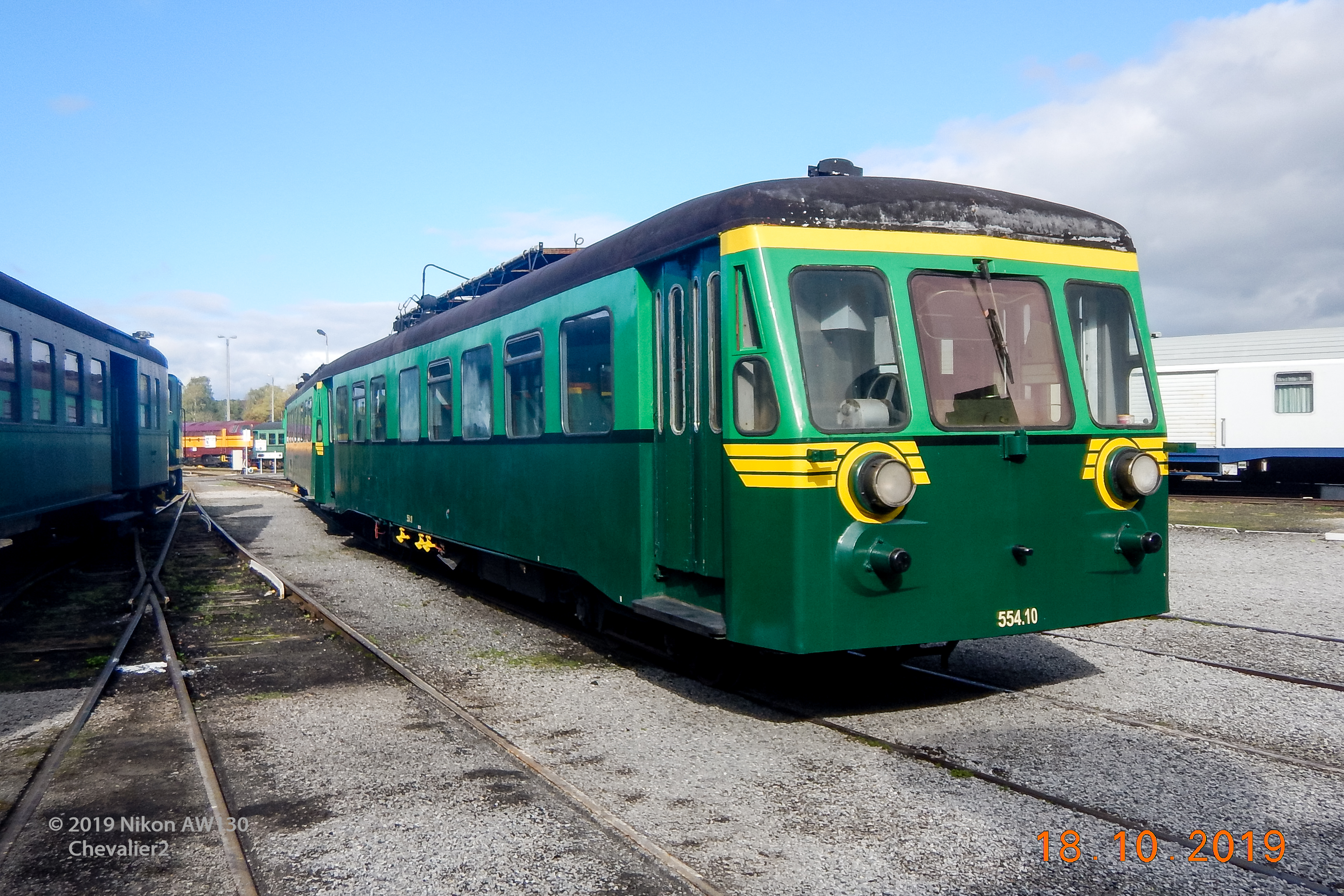 2019-Autorail 554.10 CF3V